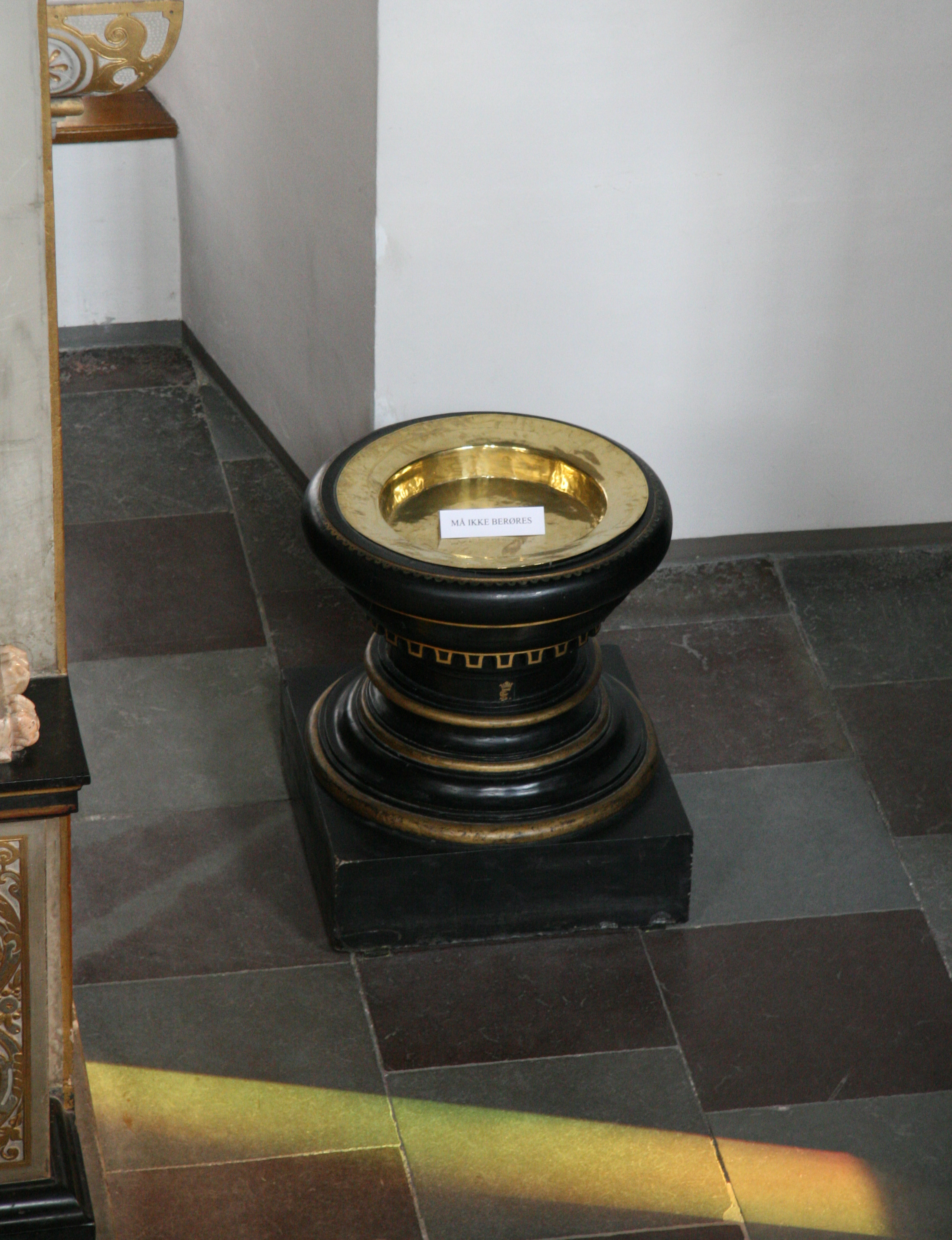 Frederiksborg Slotkirke, Hillerød, Denmark. Baptismal font